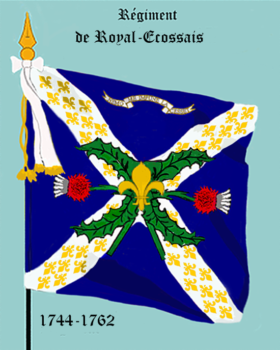 Ordonnanzfahne eines Fremdenregiments im königlich französischen Dienst. - Entnommen und überarbeitet aus: „LES UNIFORMES ET LES DRAPEAUX DE L'ARMÉE DU ROI“ Marseille 1899. (Drapeau d'Ordonnance d' un régiment etranger au service française.)